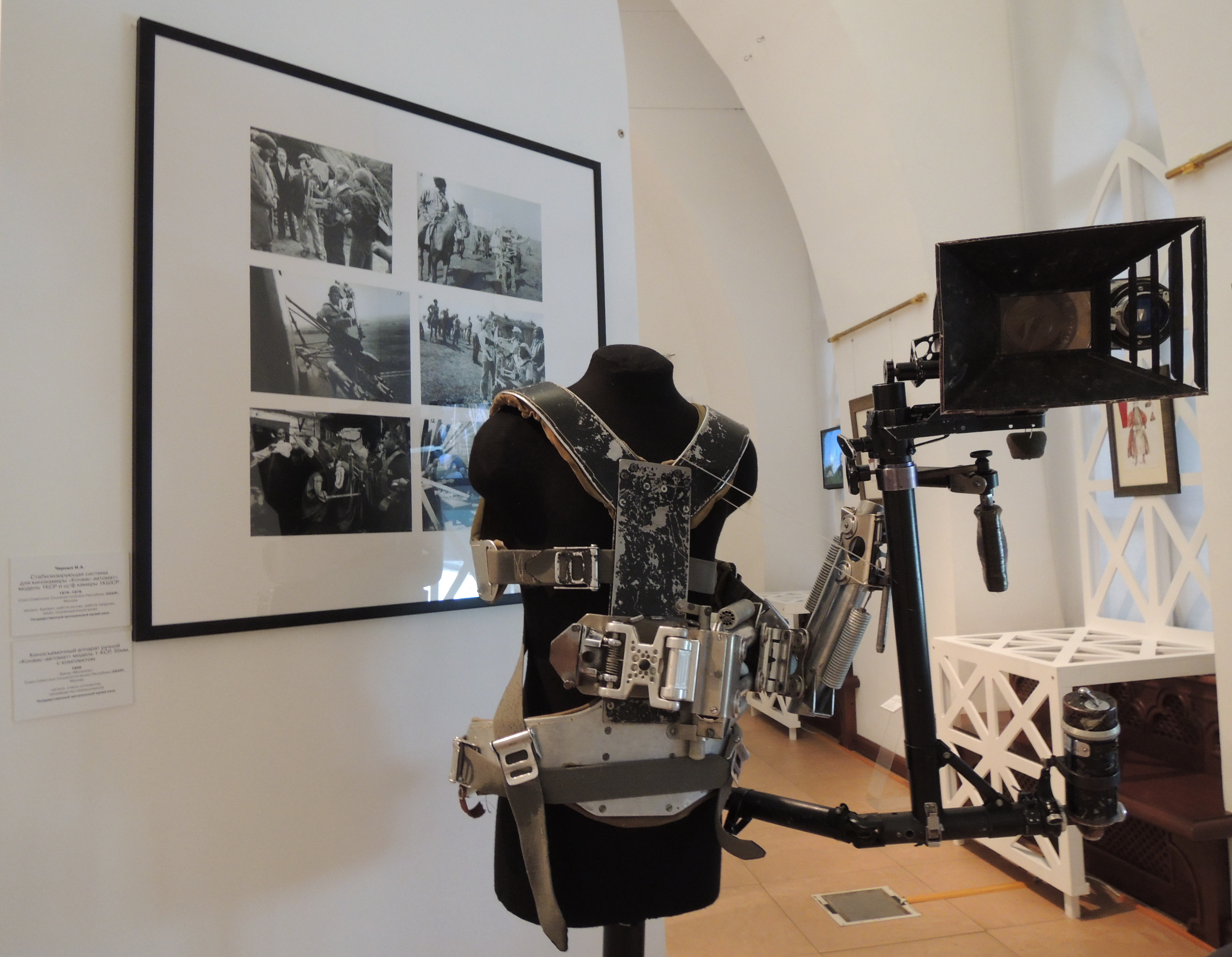 Система стабилизации киносъёмочных аппаратов, разработанная кинооператором И. А. Черных с установленной ручной камерой "Конвас-автомат" 1КСР-1М (Музей кино)